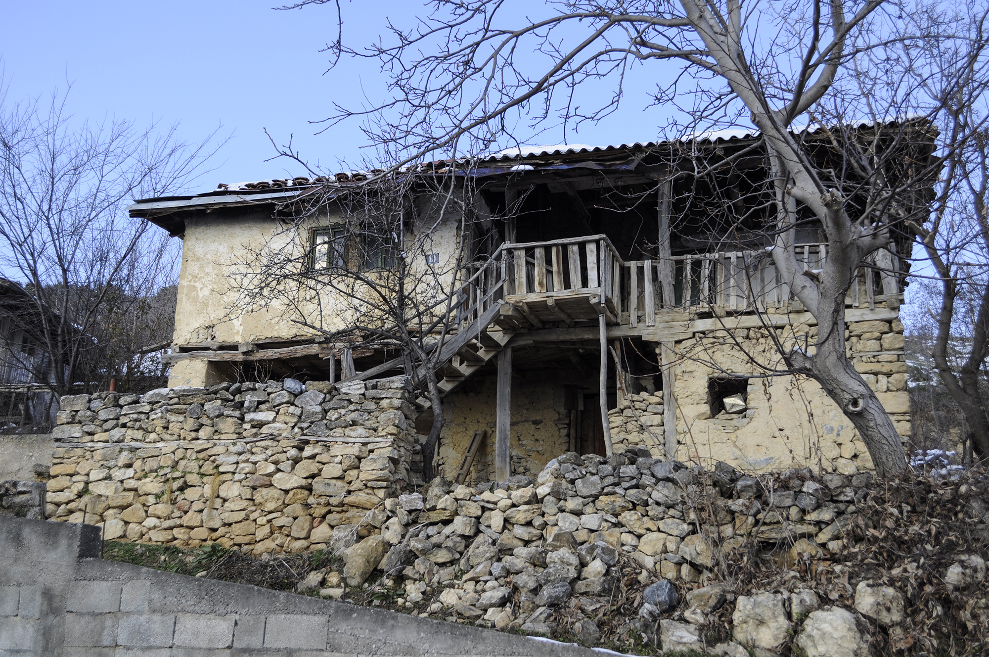 Куќа со стара архитектура во Долно Соње.